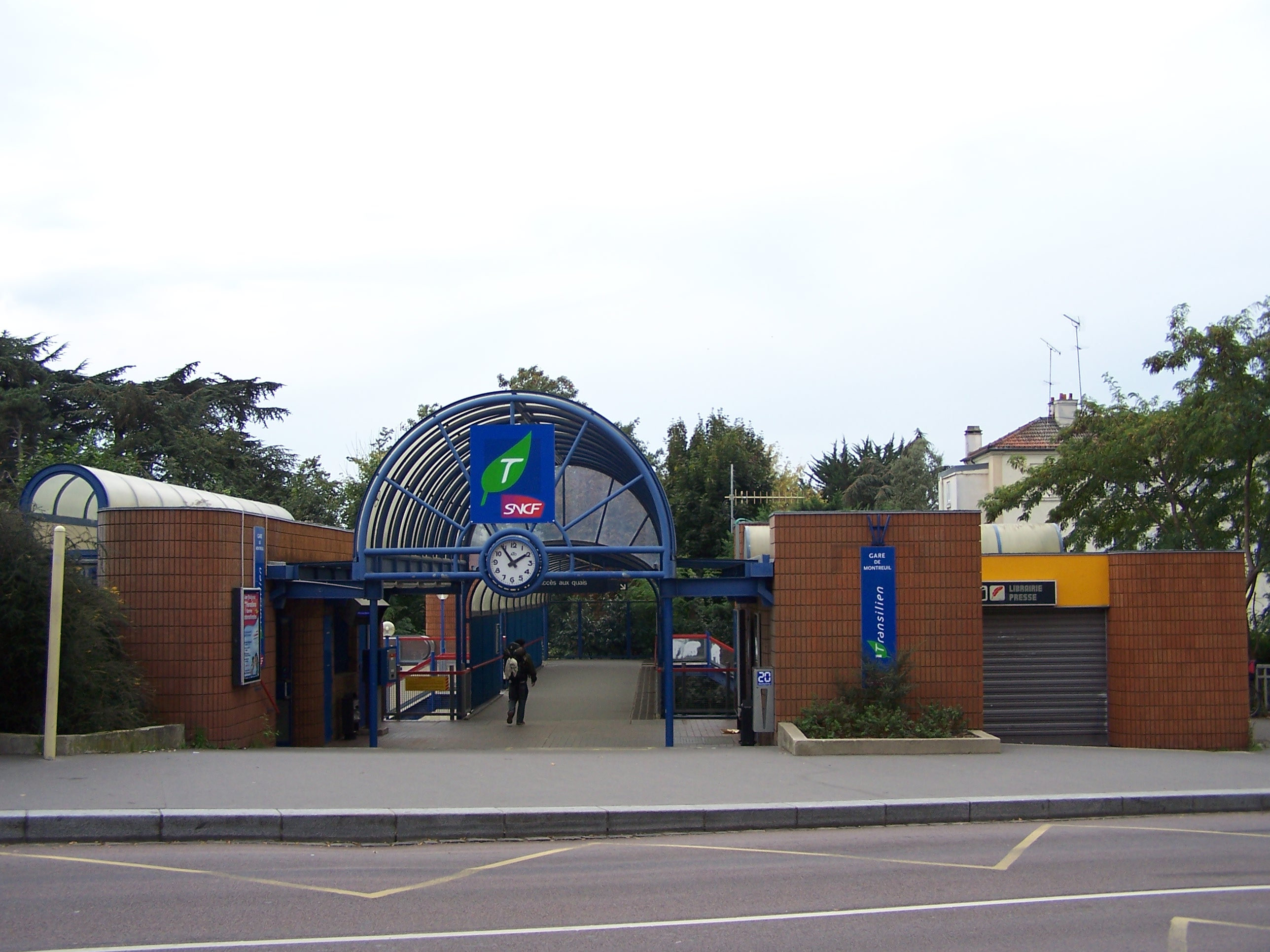 Gare de Montreuil à Versailles (Yvelines, France)